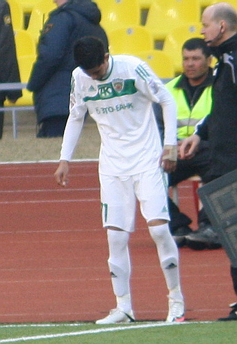 Juan Carlos Arce